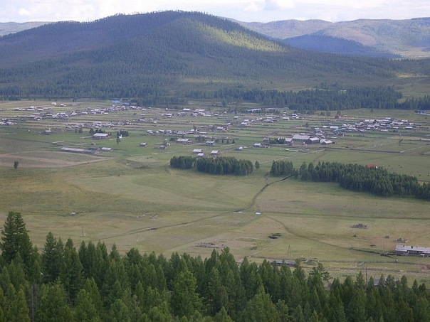 село Бортой